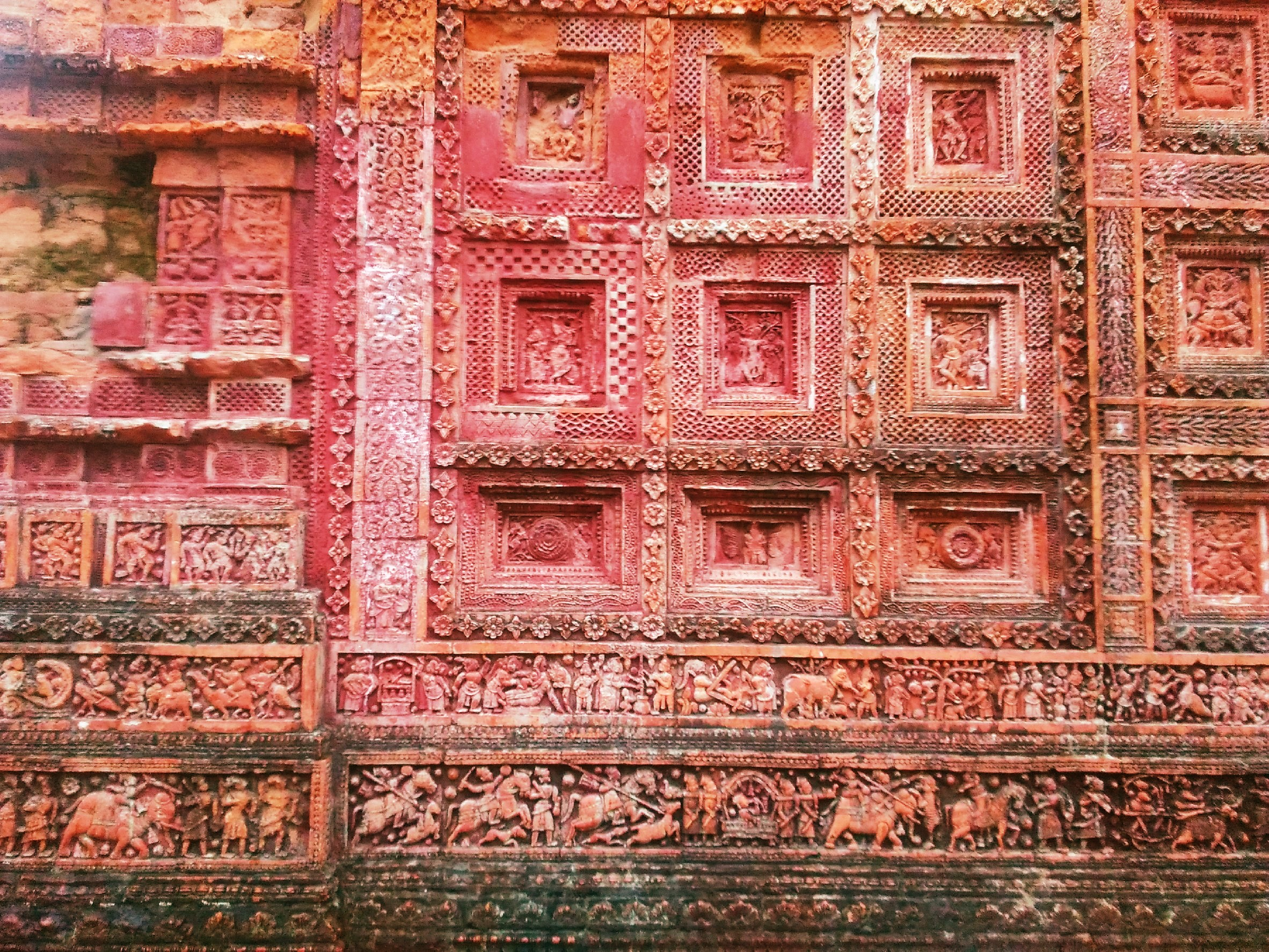 গোবিন্দ মন্দিরের দেওয়ালসজ্জায় পোড়ামাটির চিত্রফলক